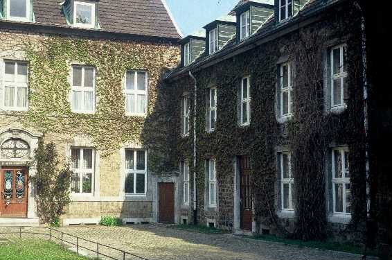 Kupferhof Stöck in Stolberg (Rhld.)